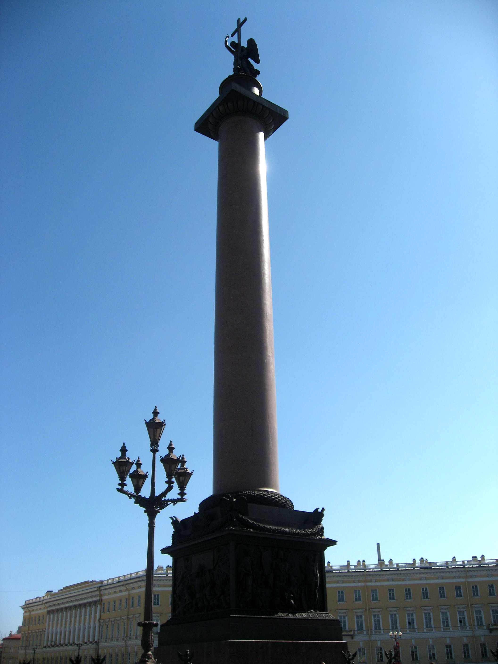 Sankt-Petěrburg